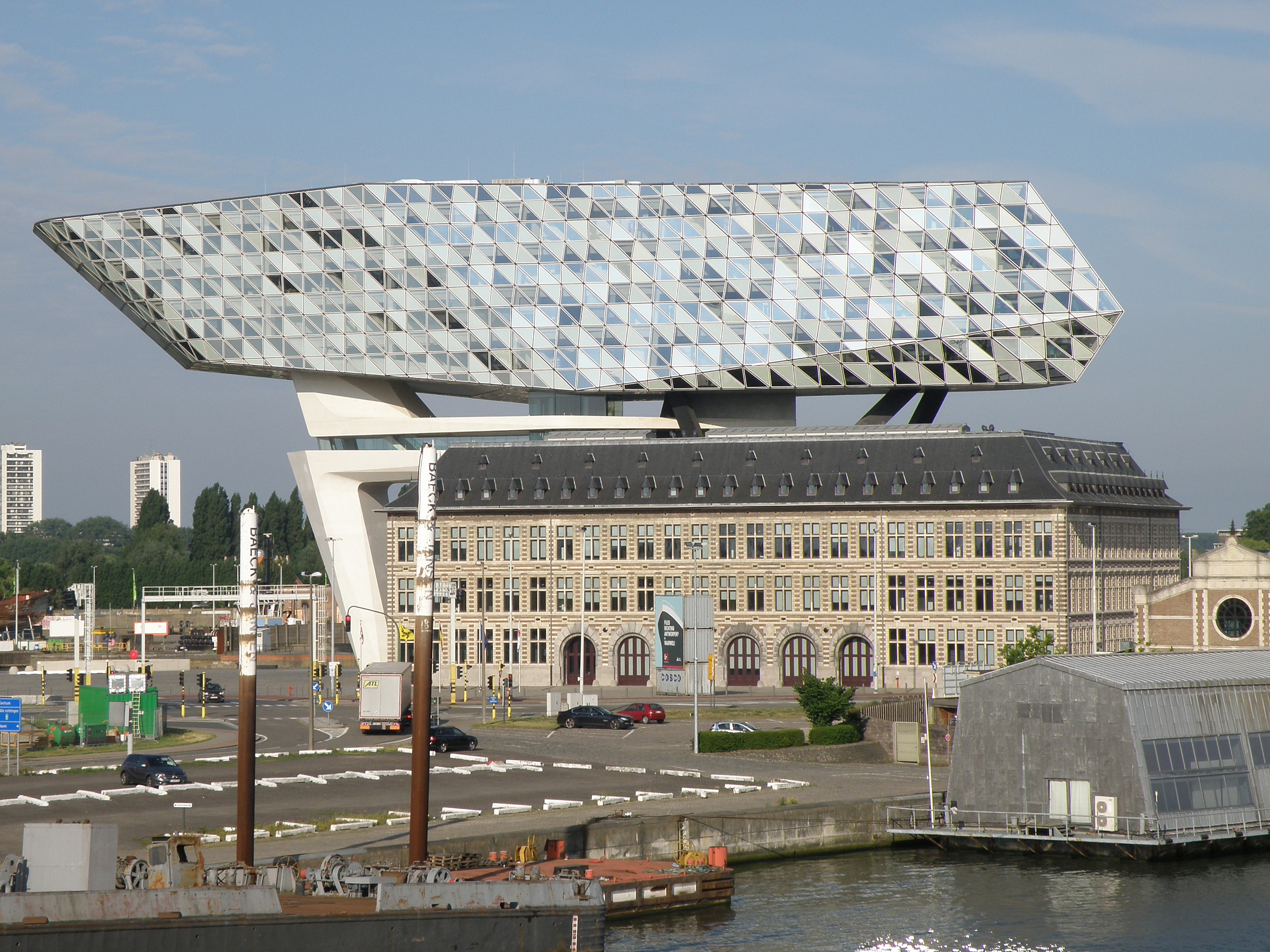 Antwerpen (België). Havenhuis, aan het Kattendijkdok.